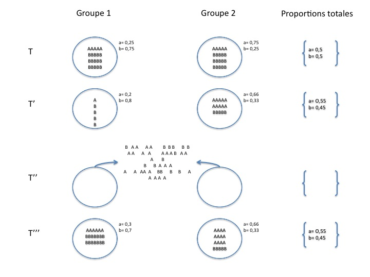 Schéma représentatif du modèle de Wilson